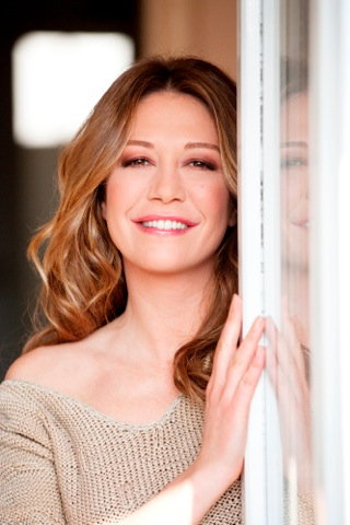 Tessa Gelisio Glamour